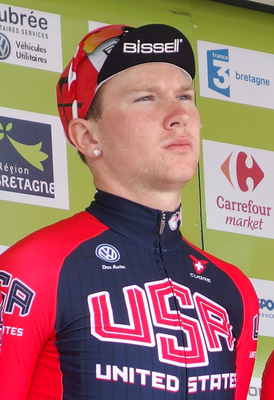 Tour de Bretagne 2014 - Présentation des équipes au départ de la sixième étape à Radenac - Équipe nationale des États-Unis Depicted person: Logan Owen